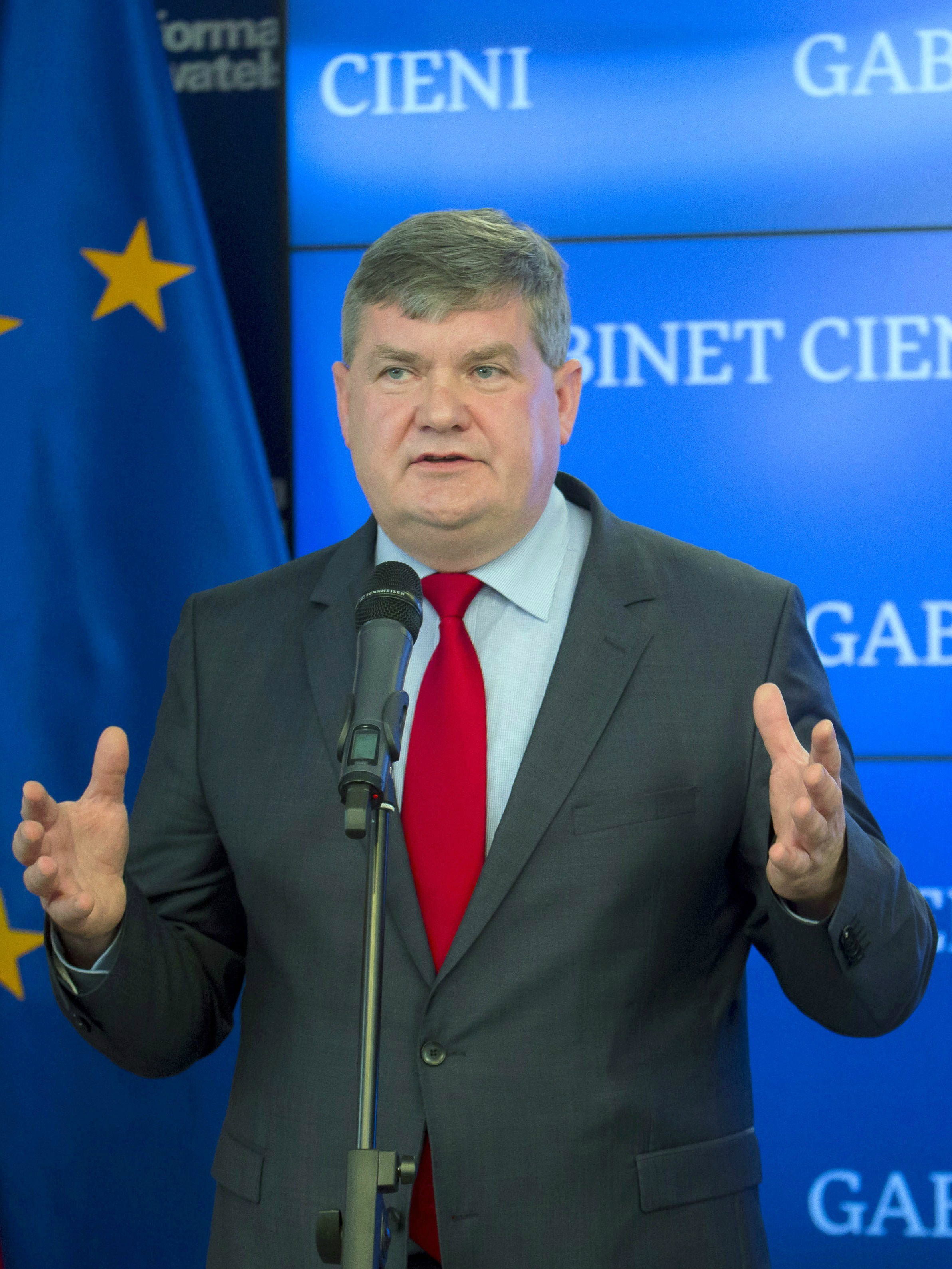 Kazimierz Plocke, samorządowiec, polityk, poseł.